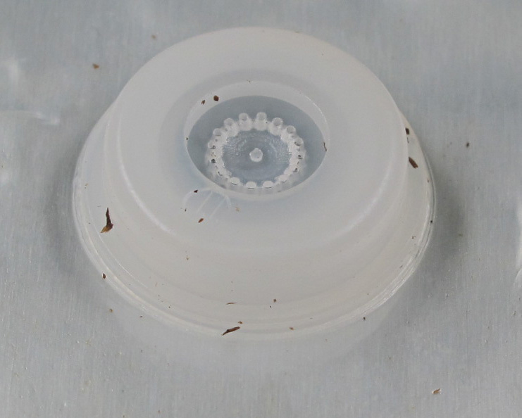 Aromaschutzventil für eine Kaffeeverpackung (Innenansicht)